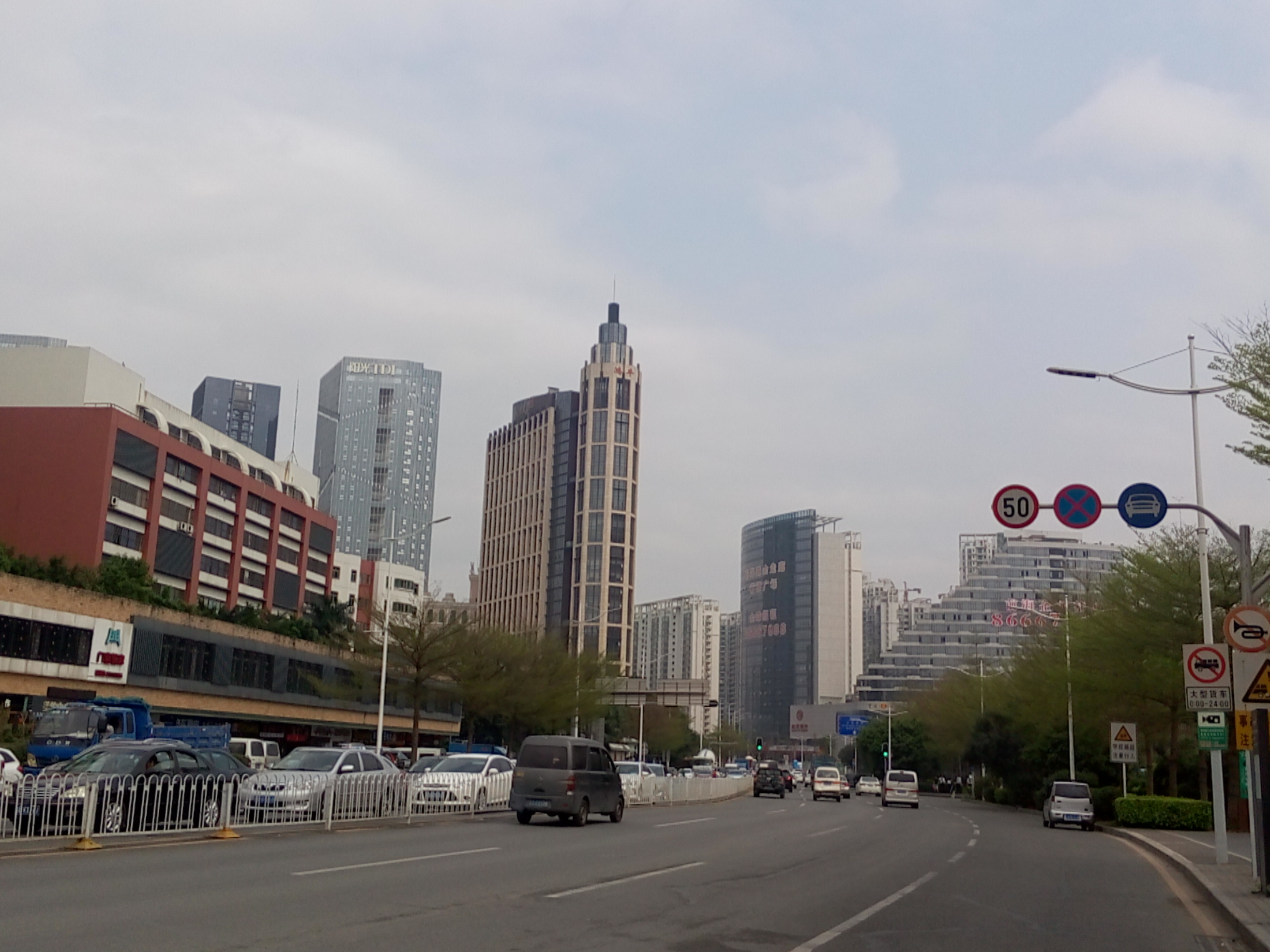 Dongbin Road, Shenzhen 東濱路